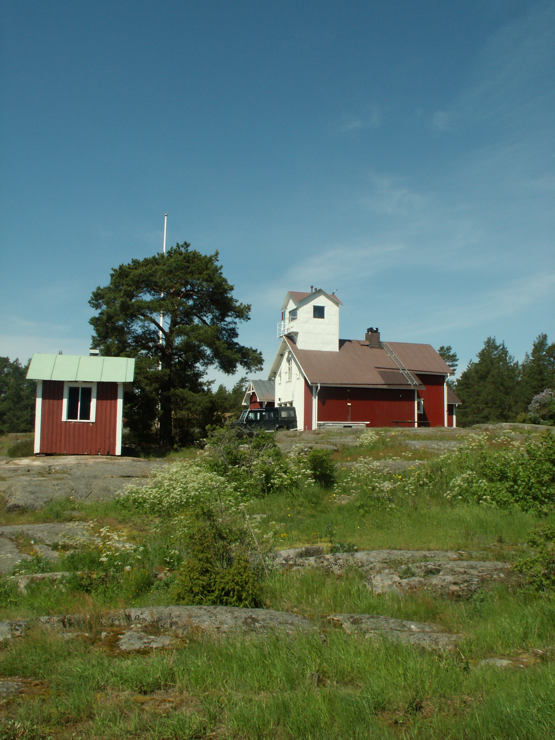 Fyret på Duse. Duse Udde fyr ved Vänern.